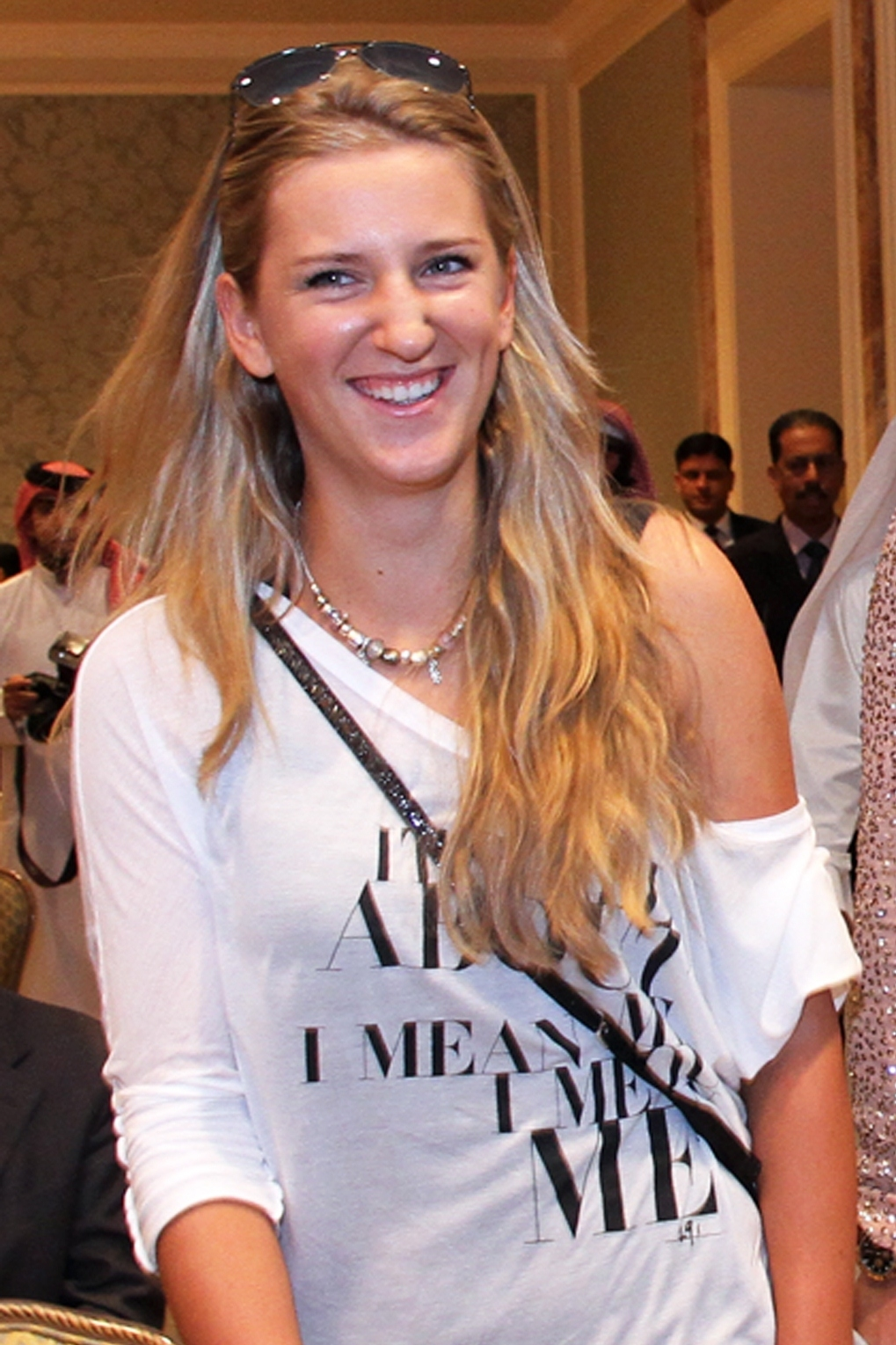 Victoria Azarenka lors de la conférence de presse à Doha.